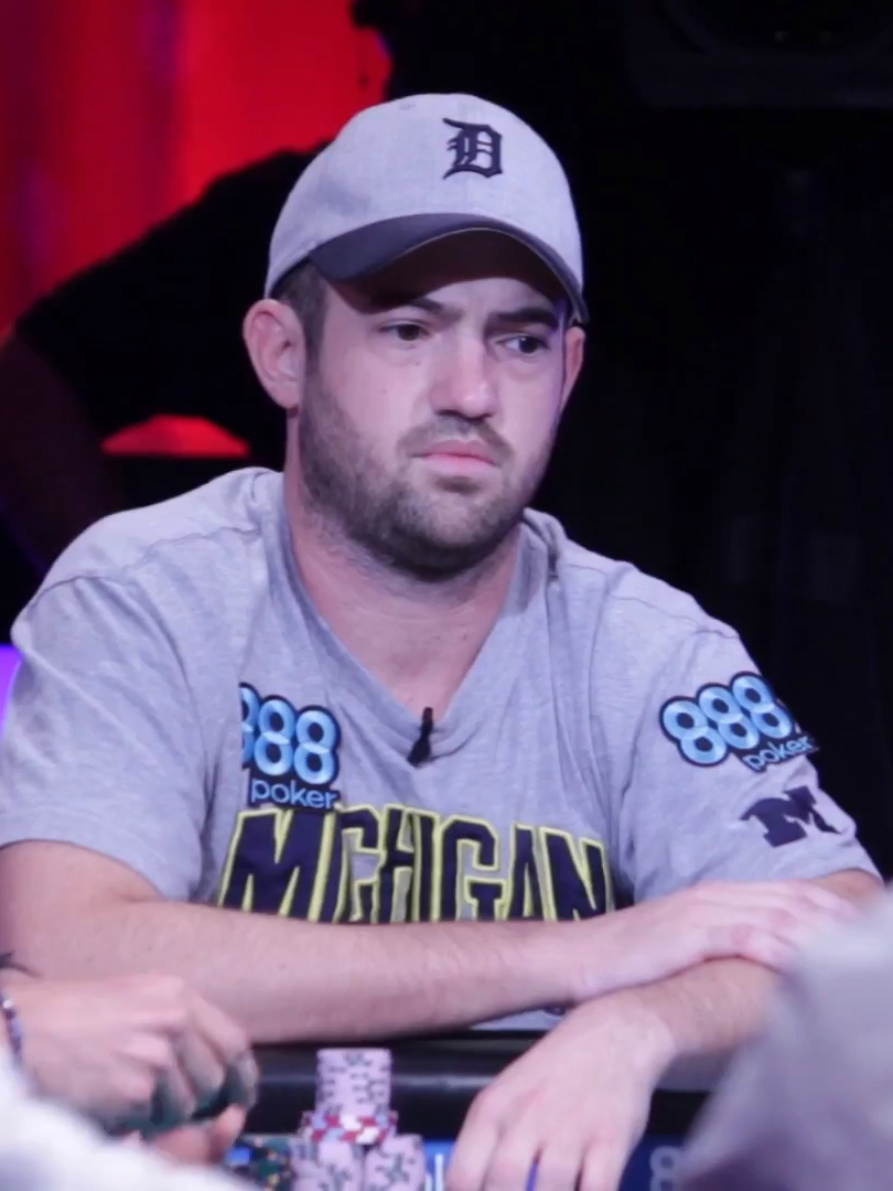 Joe Cada am Finaltisch des WSOP-Main-Events 2018